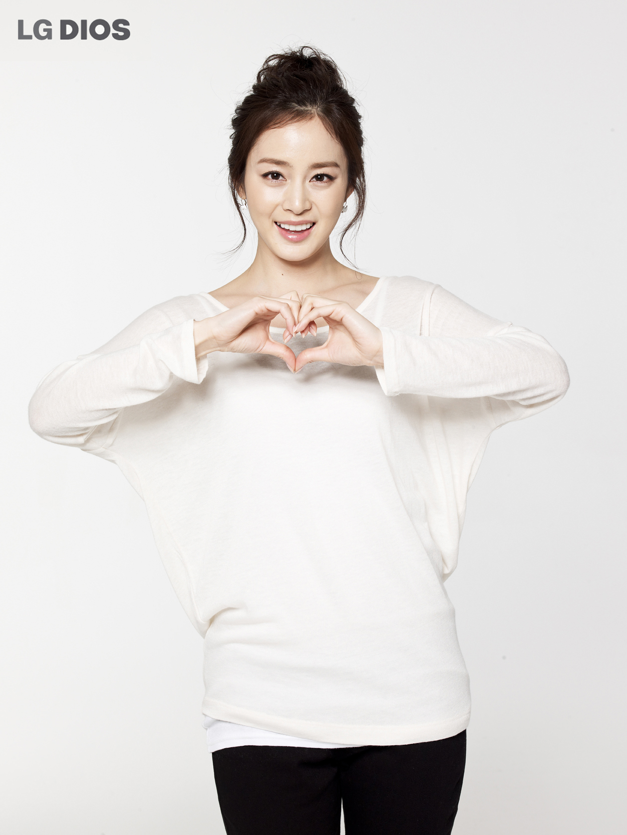 2012년 Lg dios 신제품 출시, 김태희 모델 촬영 컷